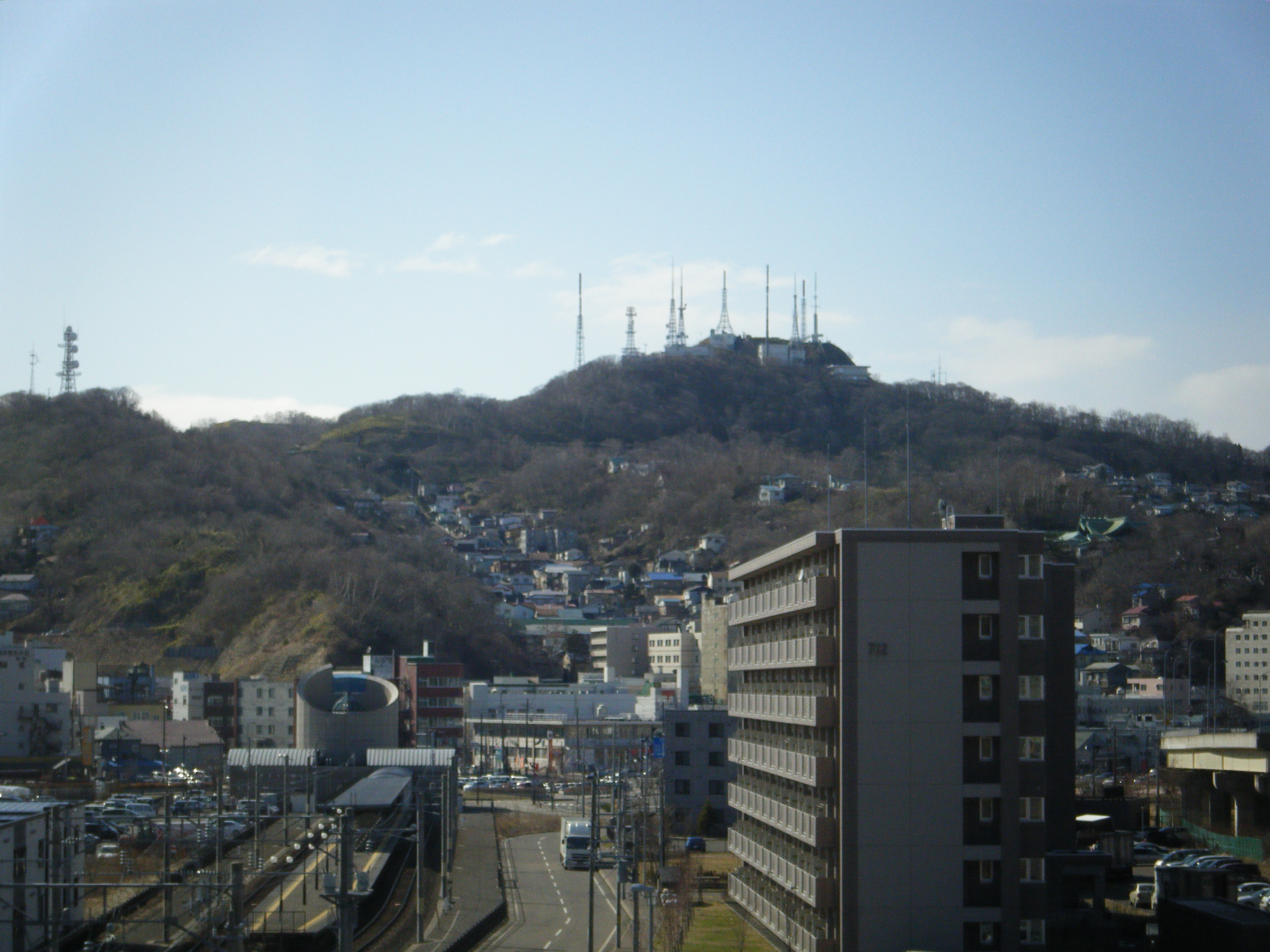 測量山（北海道、室蘭市）。室蘭新道から撮影。